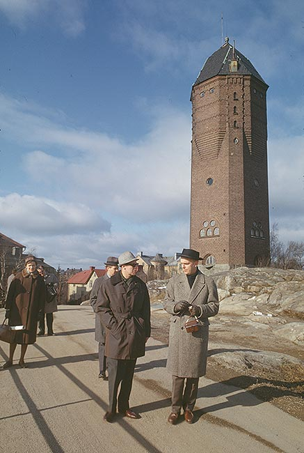 Hagalund. Vattentornet. Byggnadsår 1911-12. Arkitekt Ivar Tengbom & H G Torulf Bildnummer AN-18825 (Stockholms läns museum)